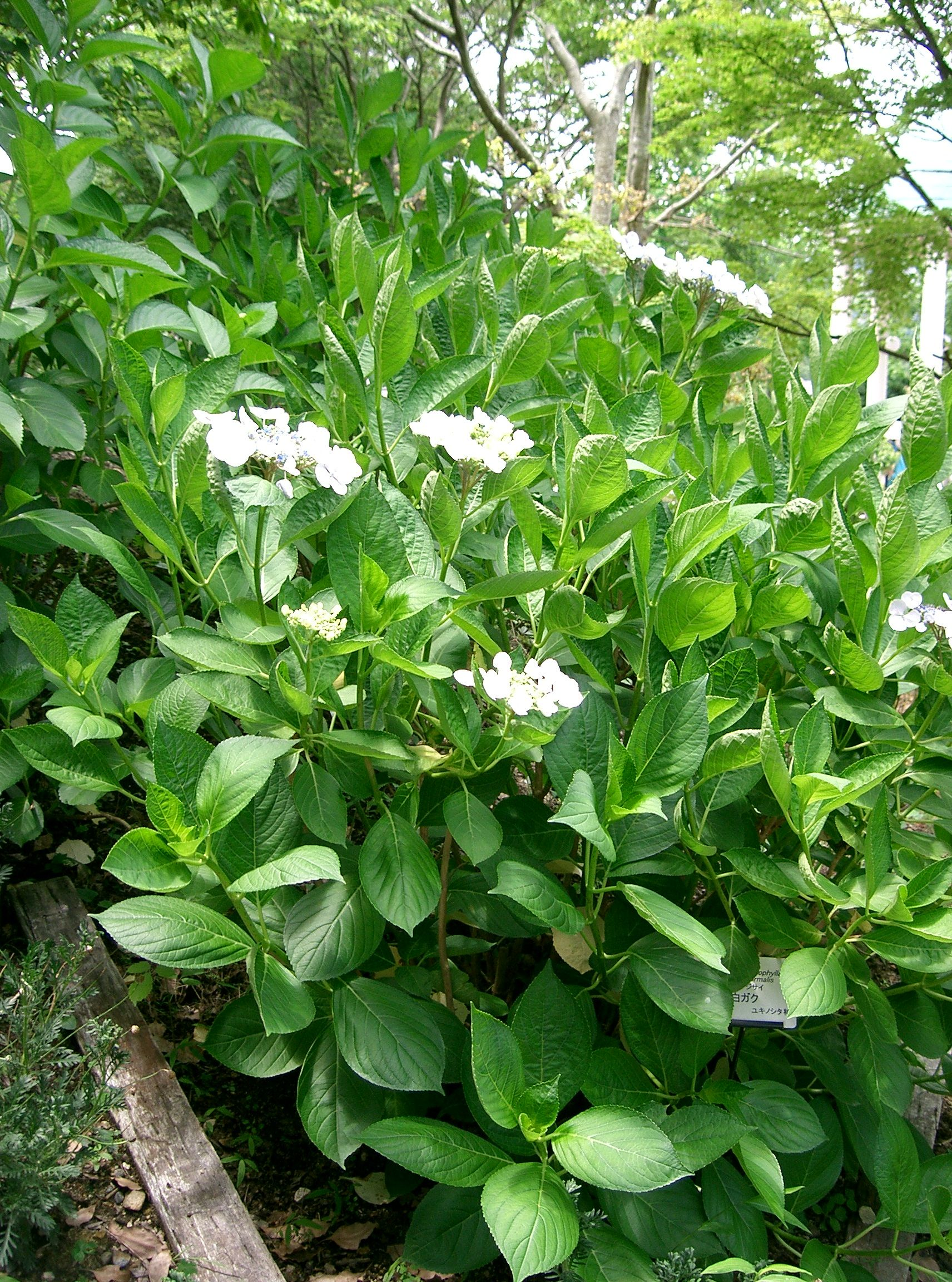 Hydrangea macrophylla f. normalis